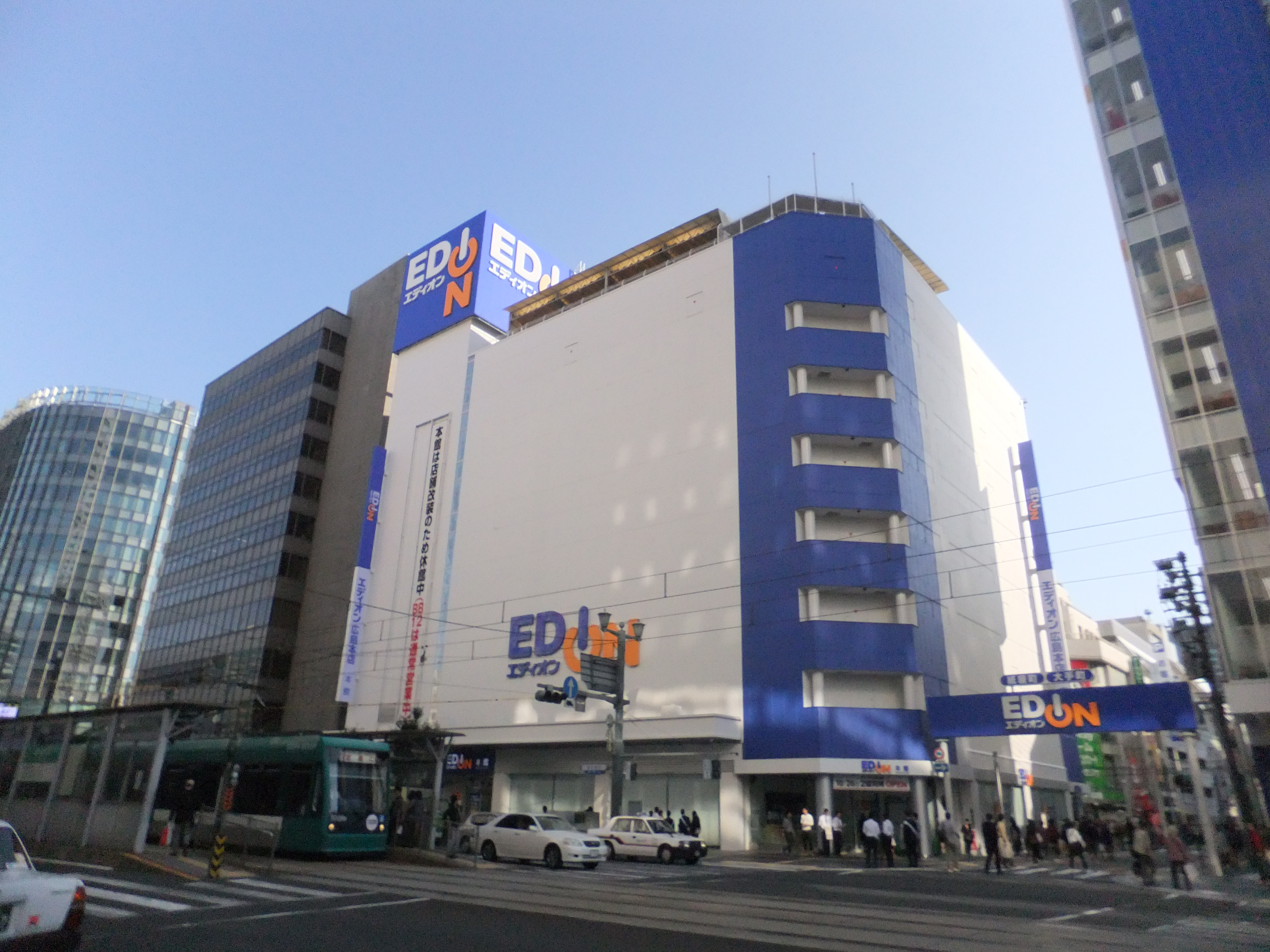 エディオン広島本店本館